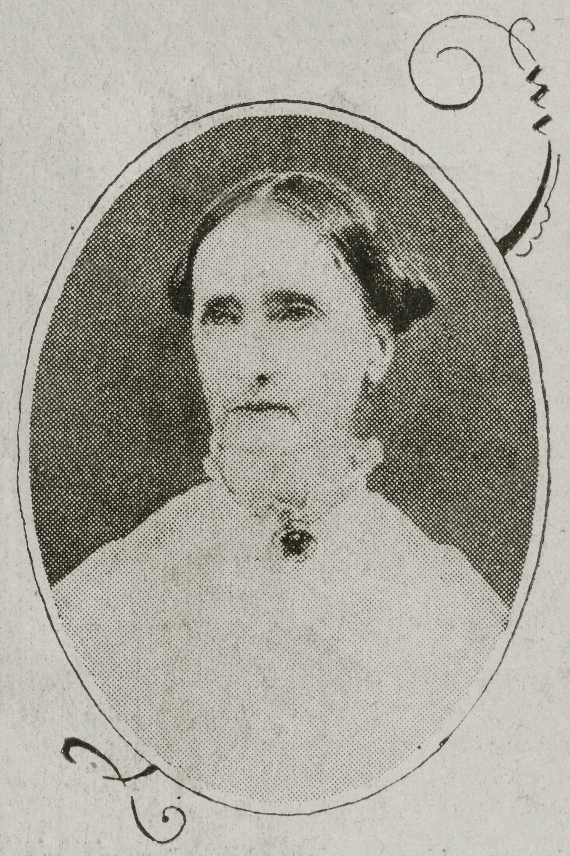 Fotografi som föreställer Edla Ulrich, lärarinna och amatörkonstnär, som levde 1816-1897